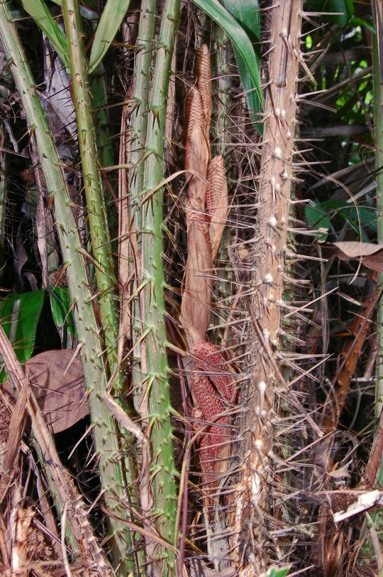 Salacca zalacca, unripe male inflorescence. Darmaga, Bogor, West Java, Indonesia